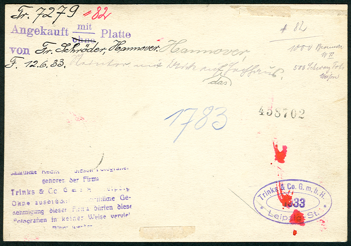 Rückseite eines Fotos eines aufgrund des Urheberrechtes (noch) nicht eindeutig zu ermittelnden Fotografen (einer Fotografin), "Angekauft (laut Stempel und Handschrift am 12. Juni 1933 von Trinks & Co.) mit Platte". Der hochaufgelöste Fotoabzug auf der Vorderseite zeigt das damalige "Steintor mit Blick auf das Gasthaus (Steintorhalle)". Handschriftlich sind auf dieser Rückseite Nummern hinzugefügt wie "Tr 7279=82", "#82", "1000 (Bromsilber ?), 500 schwarz Fotos wasser (?)", "1783" sowie ein Nummernstempel "858702", außerdem mit blauer Tinte: "Sämtliche Rechte dieser Fotografie gehören der Firma Trinks & Co. GmbH, Leipzig. Ohne ausdrückliche schriftliche Genehmigung dieser Firma dürfen diese Fotografien in keiner Weise vervielfältigt werden". Auf dem Blatt mit den Maßen circa 17cm x 11,75cm sind am oberen und unteren Rand jeweils Reste von geklebten Papieranhängern zu erkennen. Aufgrund der bei Wikimedia Commons aufgestellten Maximalforderung nach unbegrenzten Weiternutzungsmöglichkeiten "auch für gewerbliche Zwecke" werden allgemeine Bild(ungs)-Dokumente aus der Zeit des Nationalsozialismus - der Ära des seinerzeit öffentlich propagierten (industriellen) Massenmordes - wohl noch einige Zeit den heutigen Menschen vorenthalten bleiben ...